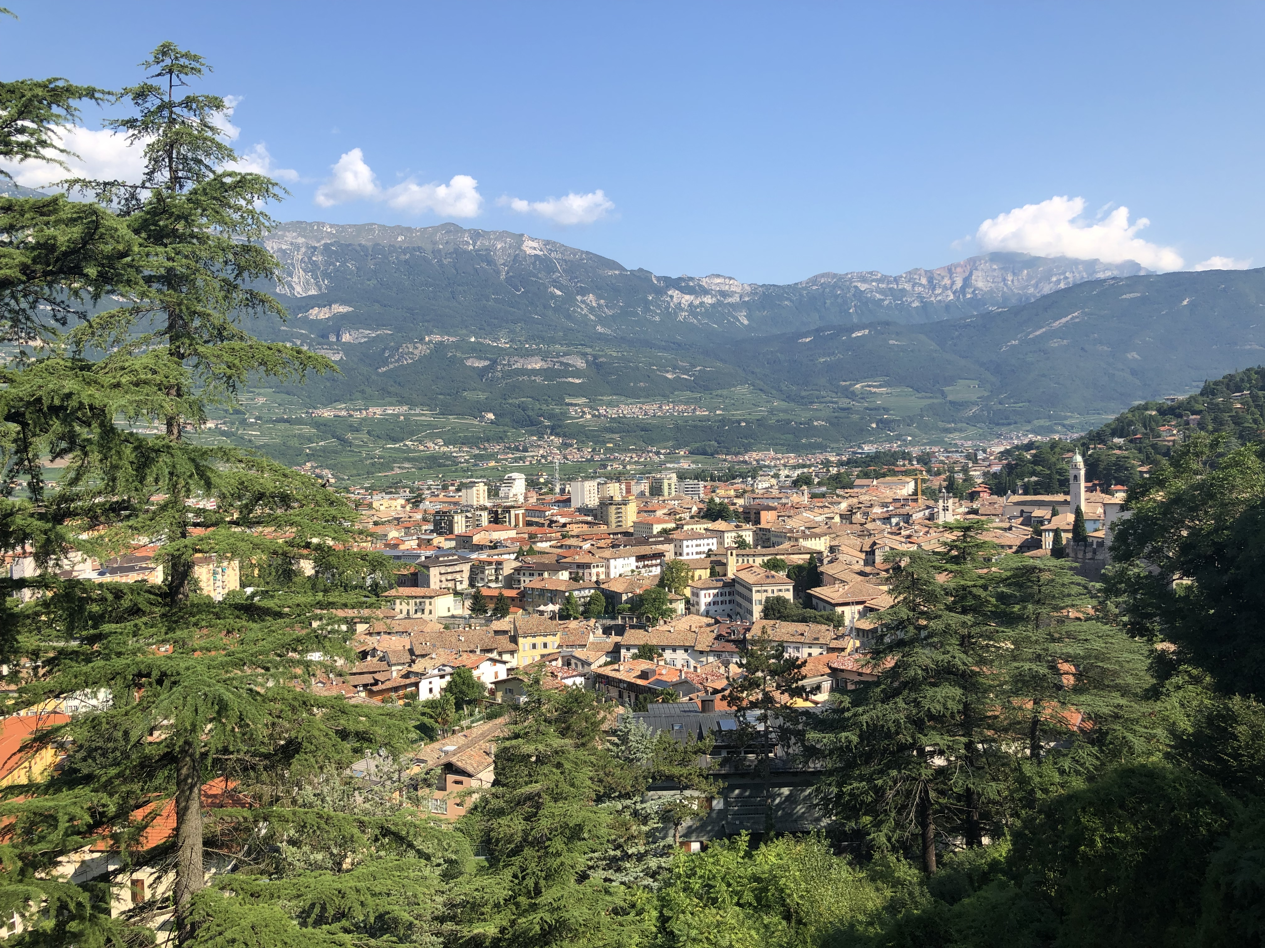 Panorama di Rovereto